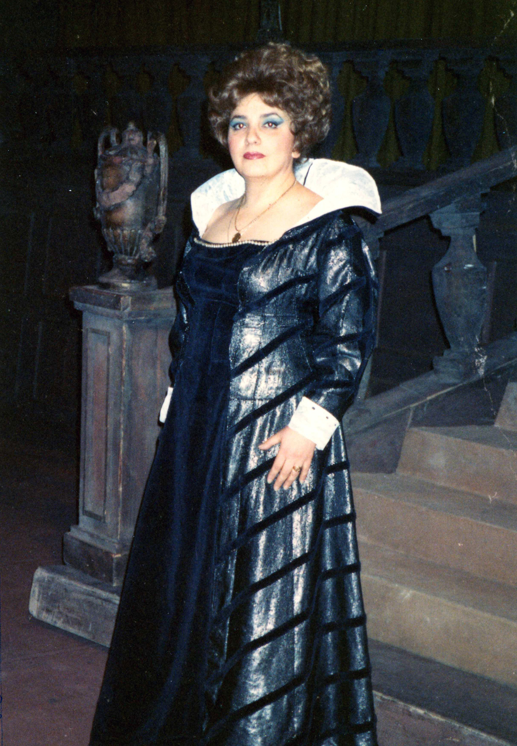 Надя Стефан Савова в Бал с маски